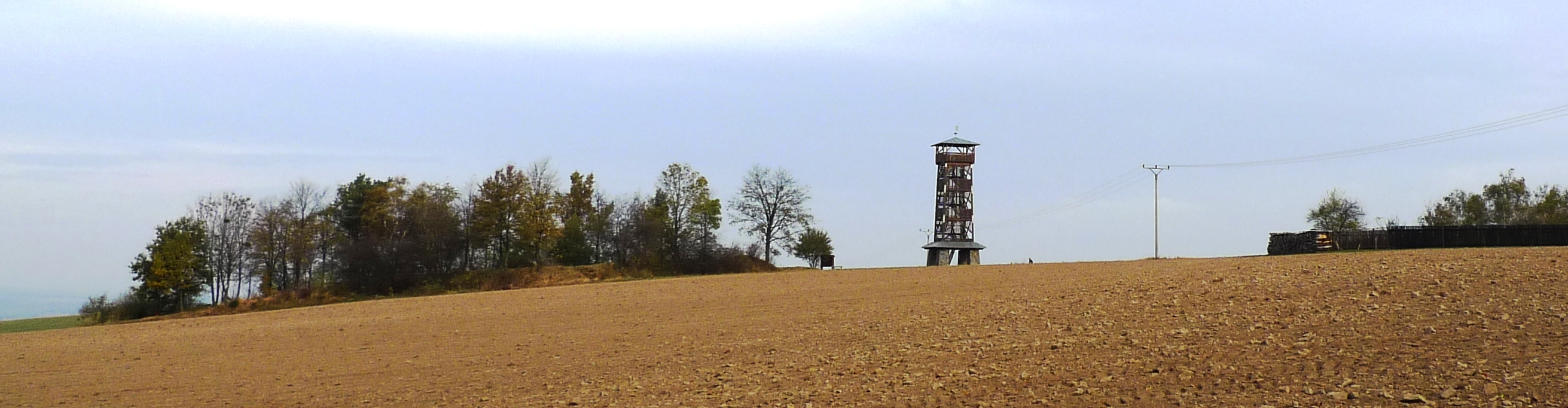 Rozhledna Šance v Jakubčovicích